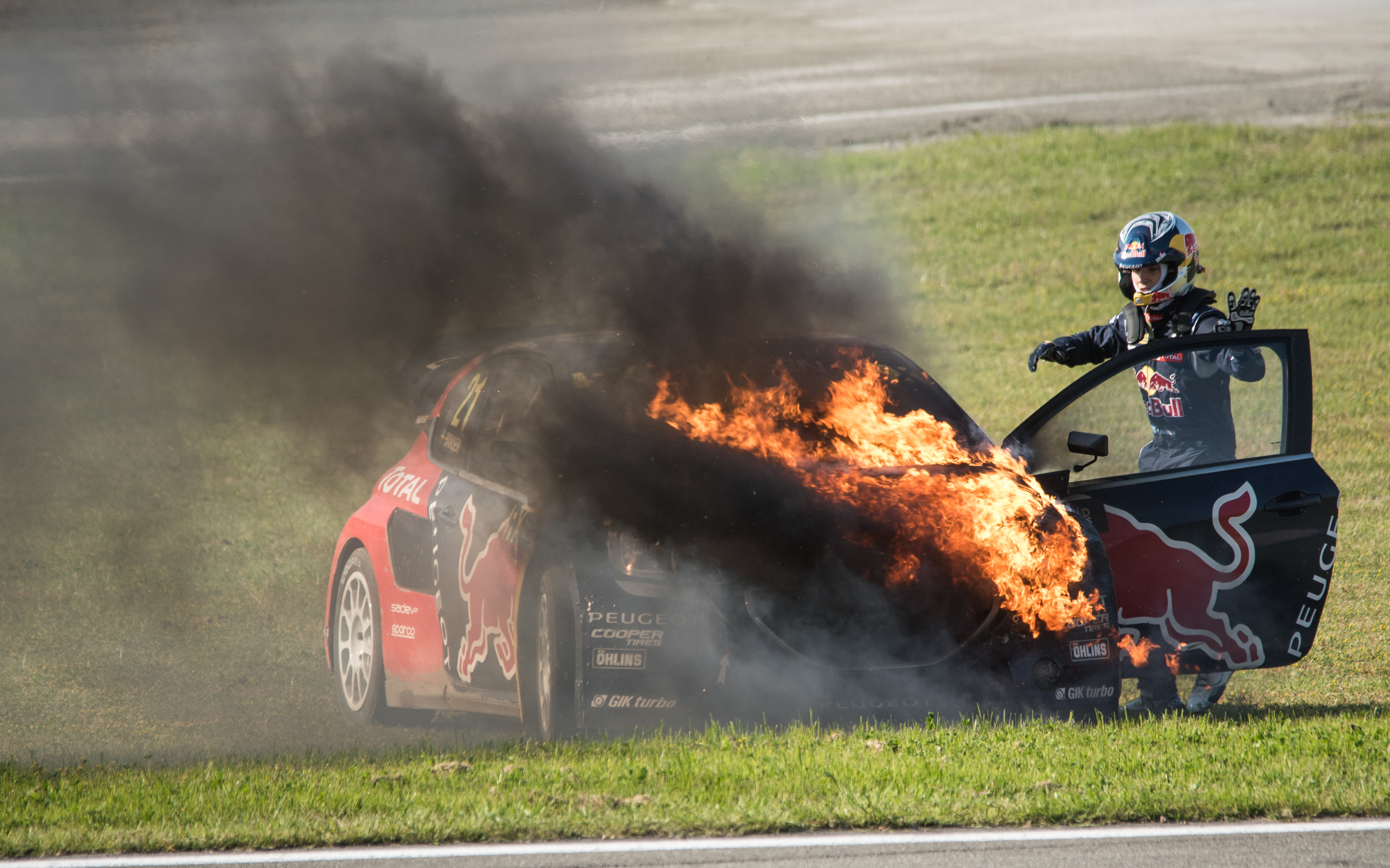 Peugeot 208